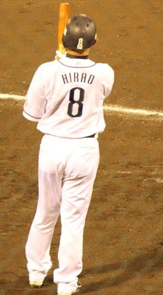 hirao hiroshi